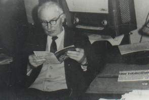 Walter Ewert - Gützkow